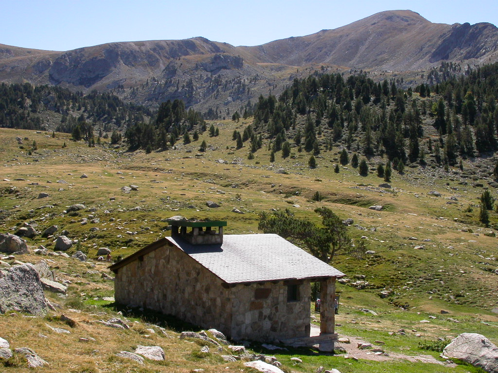 Refuges Andorre Refugi de Perafita